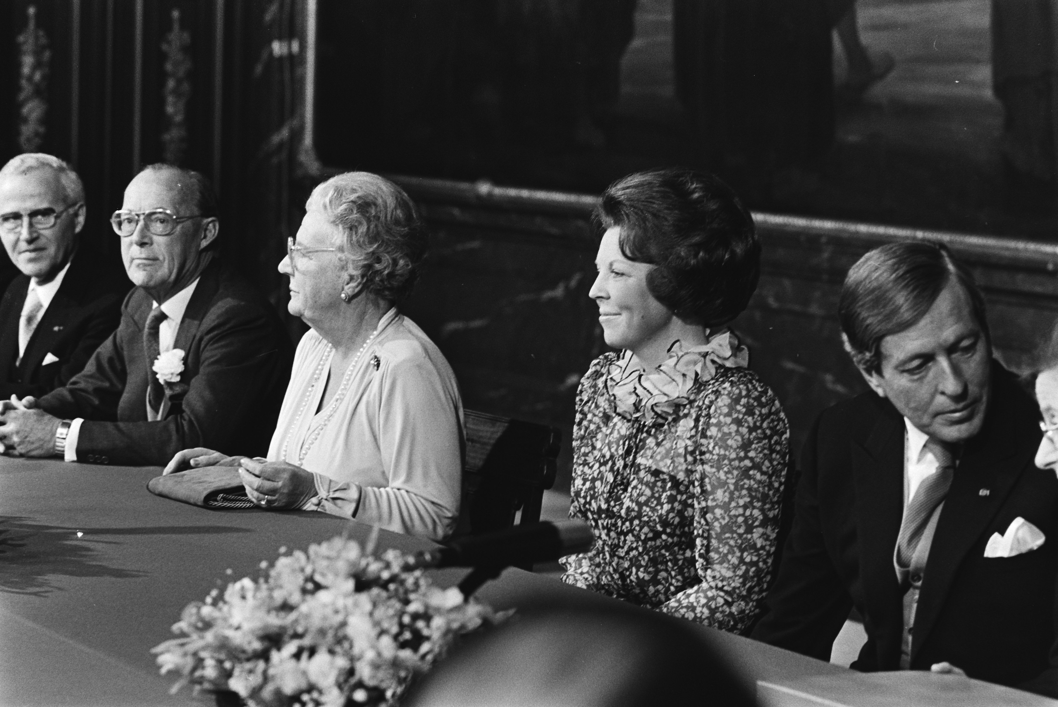 Collectie / Archief : Fotocollectie Anefo Reportage / Serie : Troonswisseling 30 april 1980 Beschrijving : Troonwisseling 30 april, bijeenkomst voor de abdicatie in Paleis Op de Dam Annotatie : vlnr. Dr. Th.L.M. (Theo) Thurlings (voorzitter Eerste Kamer) , prins Berhard, koningin Juliana, prinses Beatrix, prins Claus, nog net zichtbaar mej. Tellegen, directeur van het Kabinet van de Koningin Datum : 29 juli 1980 Locatie : Amsterdam, Noord-Holland Trefwoorden : koningin, prins, prinses, troonopvolging Persoonsnaam : Beatrix, prinses, Bernhard, prins, Juliana, koningin Fotograaf : Poolfoto Auteursrechthebbende : Nationaal Archief Materiaalsoort : Negatief (zwart/wit) Nummer archiefinventaris : bekijk toegang 2.24.01.05 Bestanddeelnummer : 930-9423